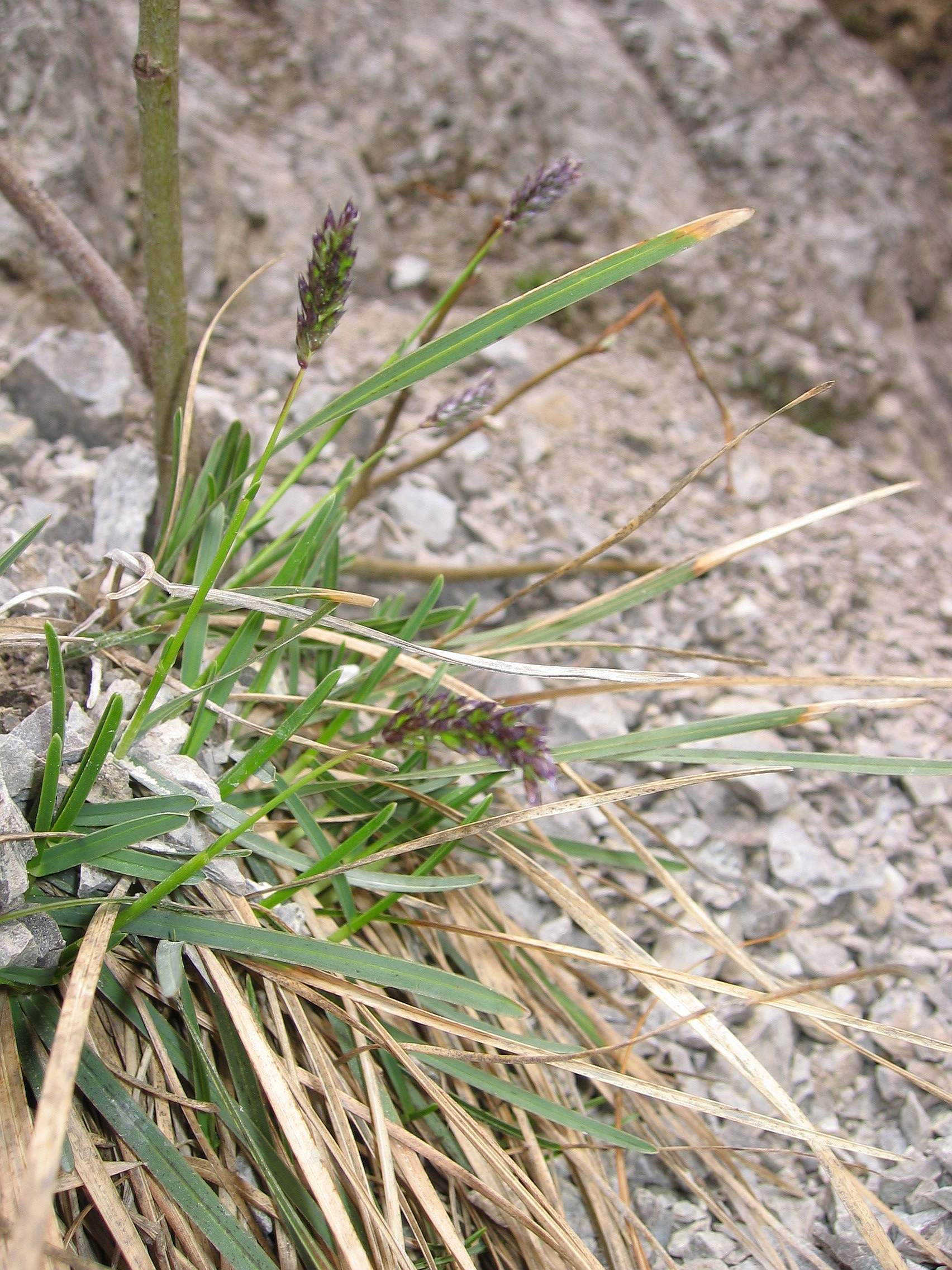 Sesleria albicans Kaltenbachwildnis, Upper Austria, Austria